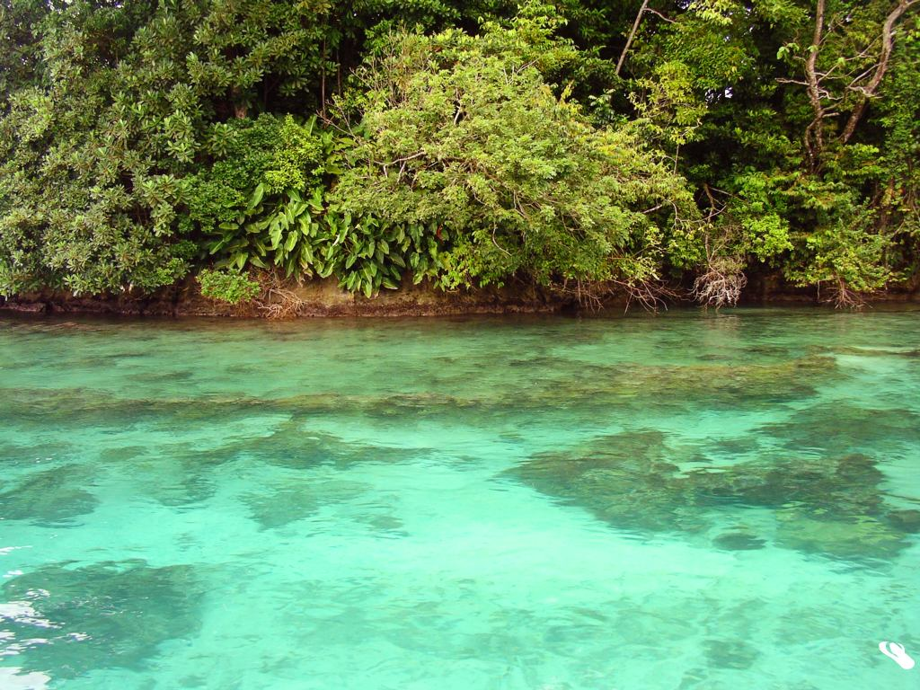 Vista de las aguas trasparentes en la Isla Escudo de Veraguas en Bocas del Toro